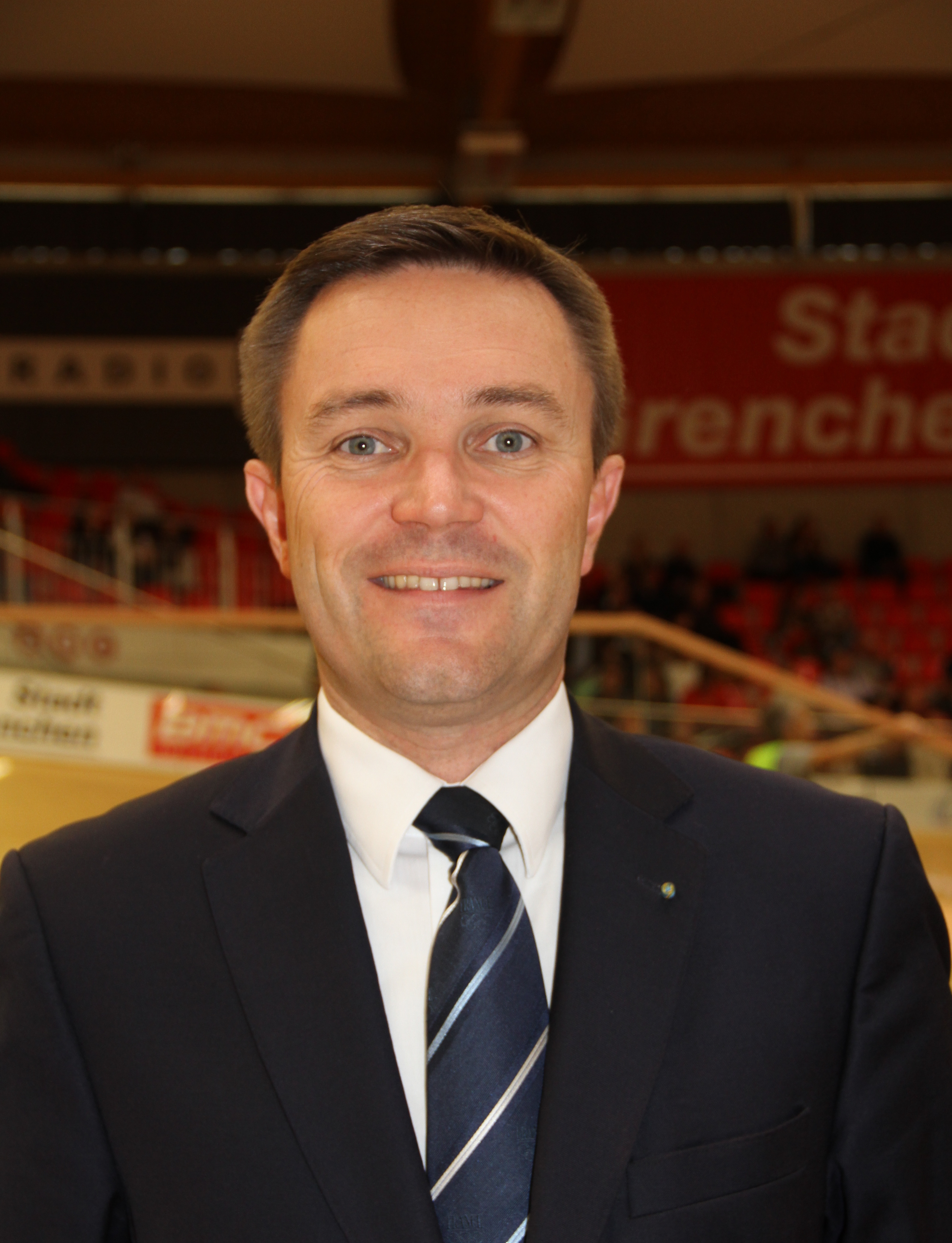 David Lappartient, Präsident der FFC und der UEC The making of this document was supported by the Community-Budget of Wikimedia Germany.